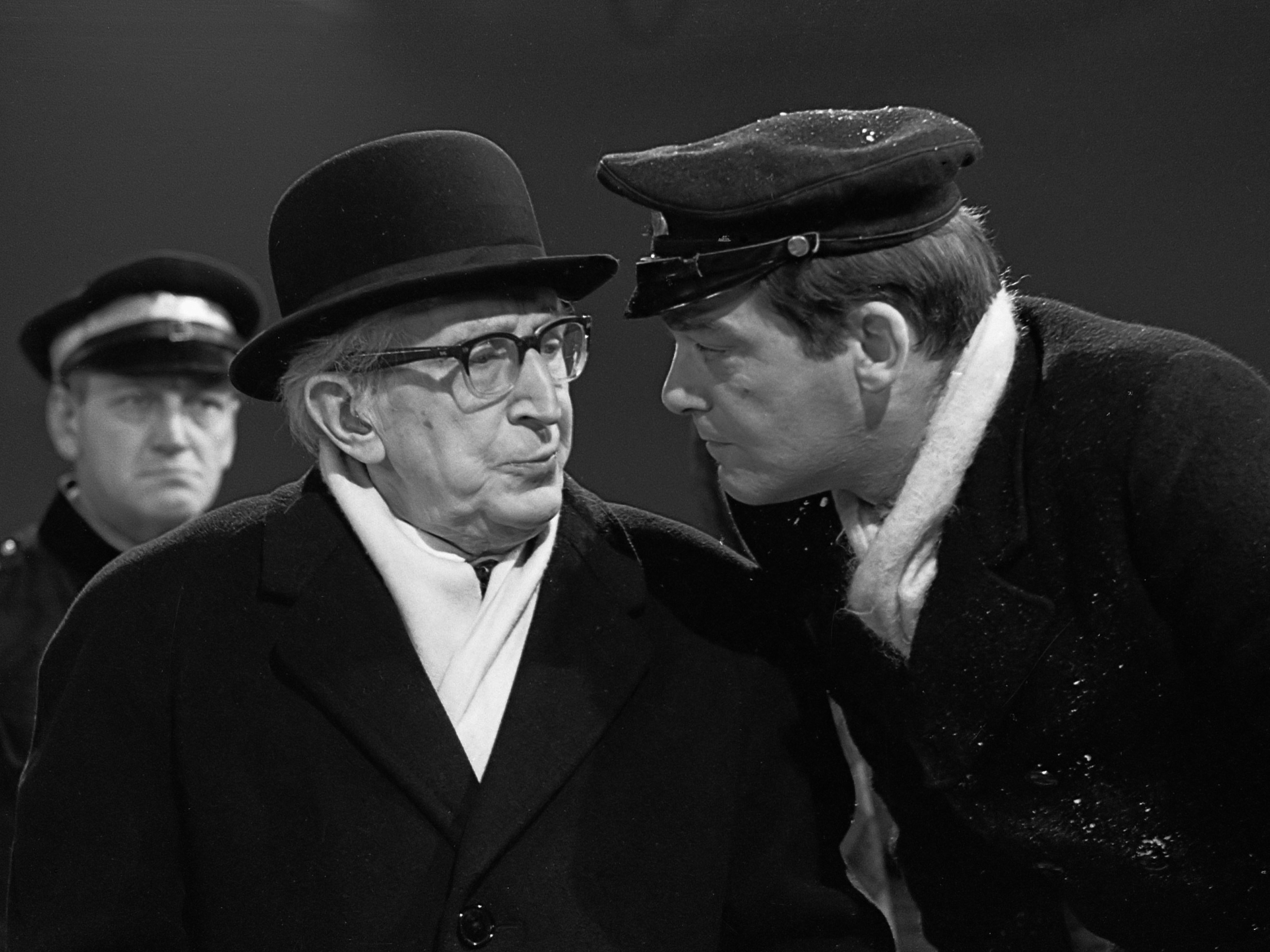 'De maan schijnt over Kylenamoe', eenakter voor NCRV-tv. Ko Arnoldi (links) en Jan Blaaser (rechts) in de hoofdrollen 12 februari 1963